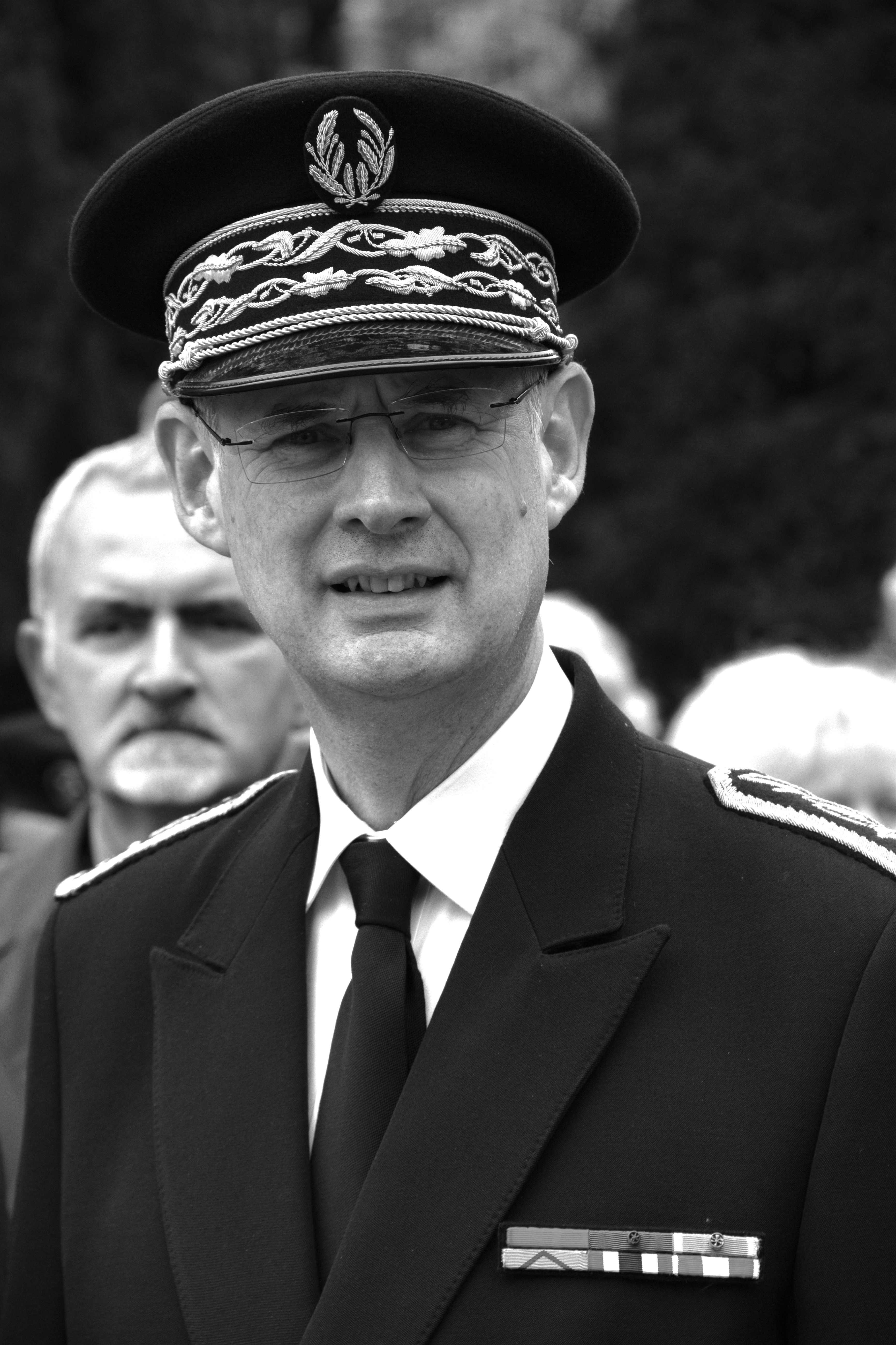 Stéphane Bouillon, préfet de la région Alsace et du Bas-Rhin